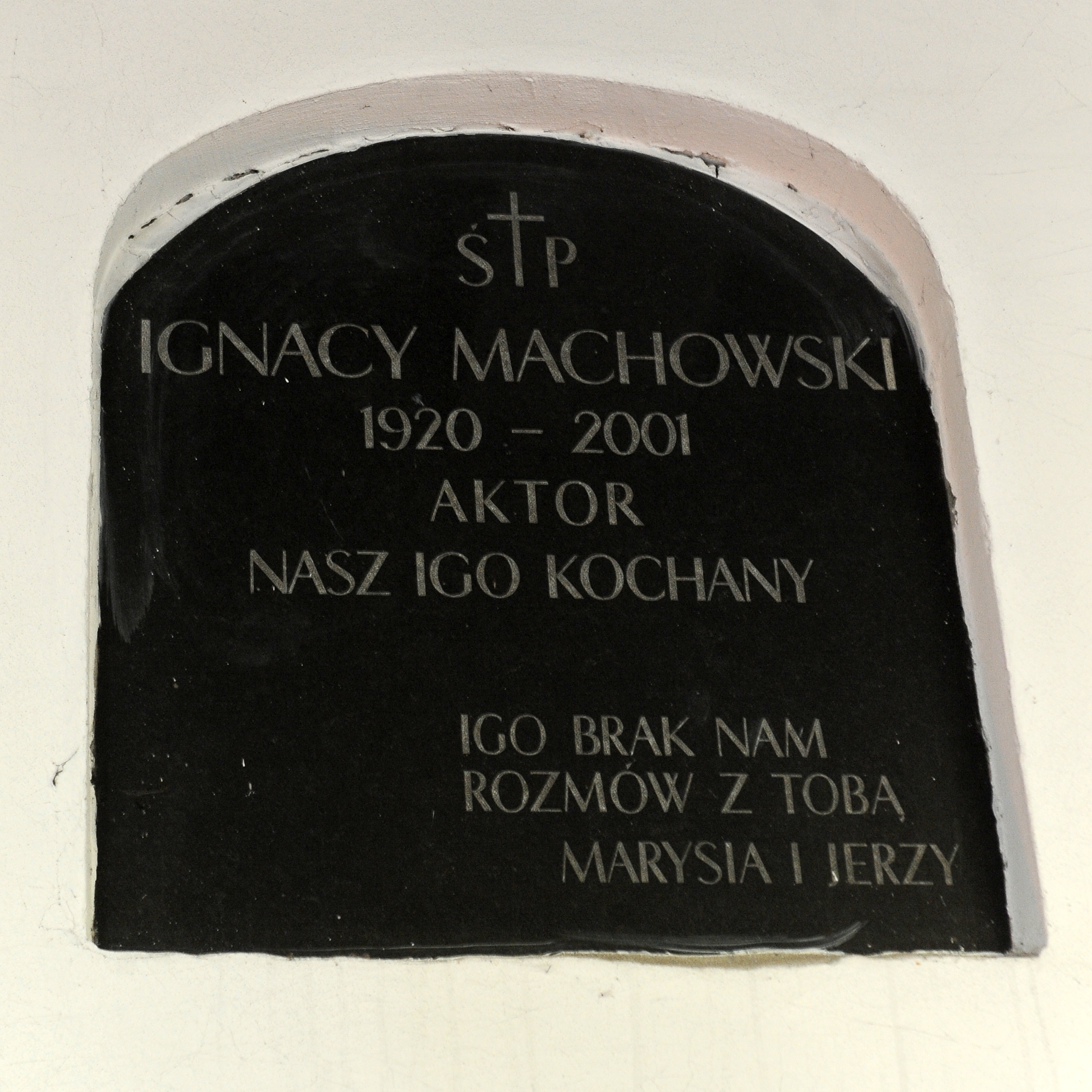 Ignacy Machowski, grób na Starych Powązkach w Warszawie